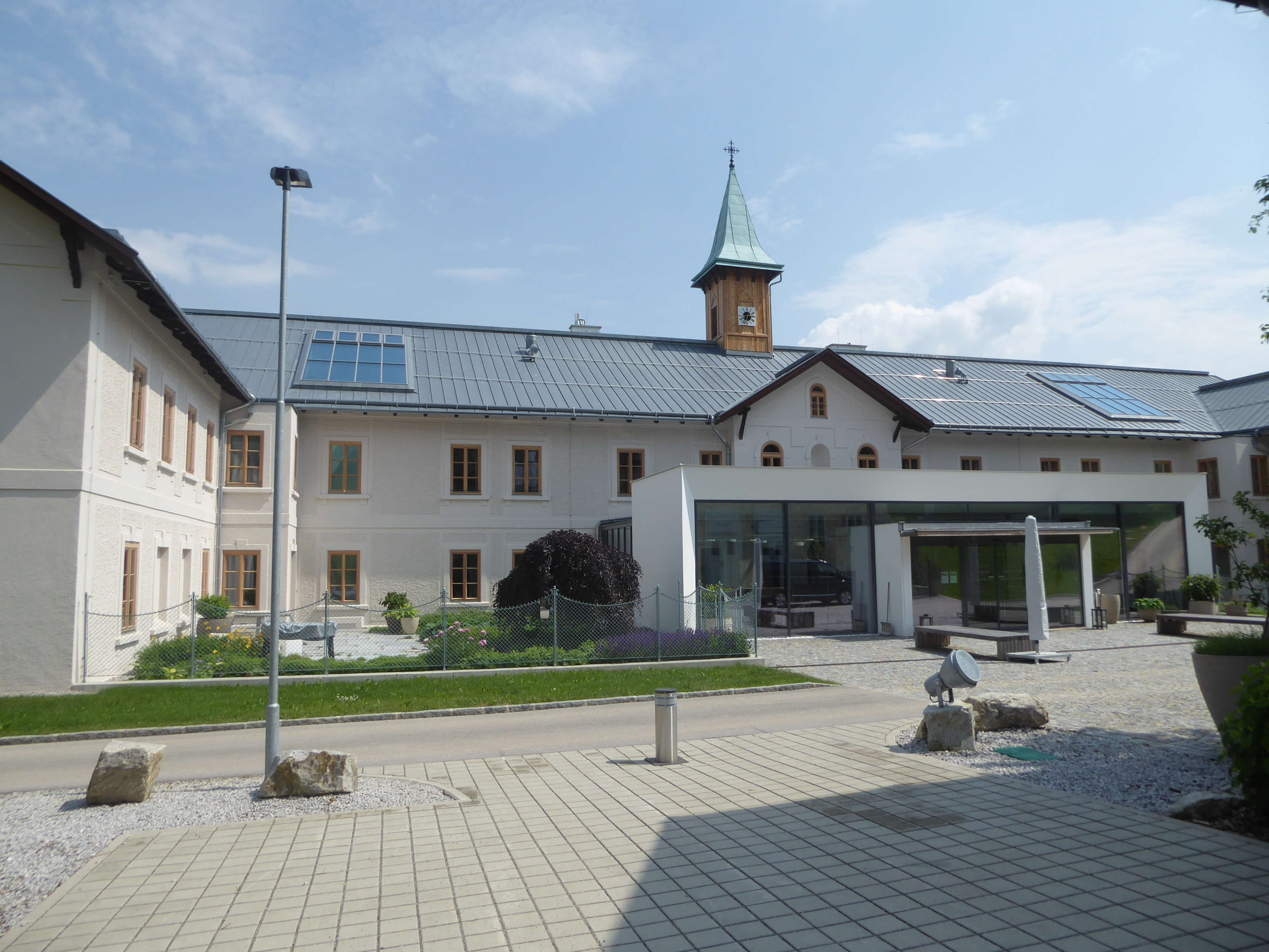 Refugium Hochstraß, ehem. Kloster des Ordens der Töchter der göttlichen Liebe, landw. Haushaltsschule, Hochstraß 7, Stössing, Niederösterreich (nach Restaurierung und Umbau 2015)